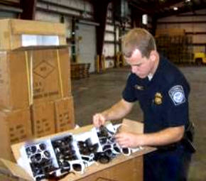 Counterfeit sunglasses